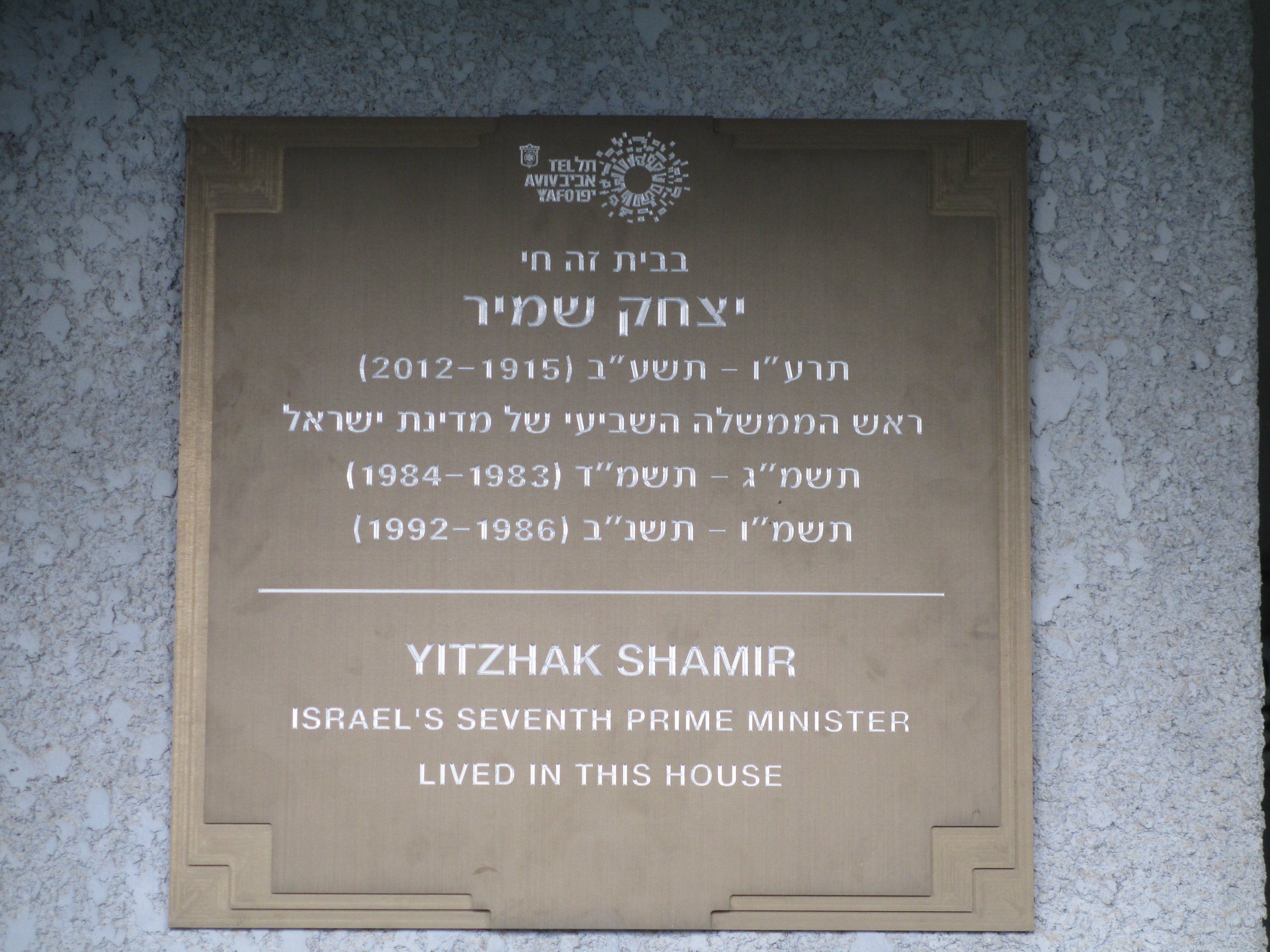 לוחית זיכרון בכניסה לביתו של יצחק שדה ברחוב משה שרת 34 בתל אביב